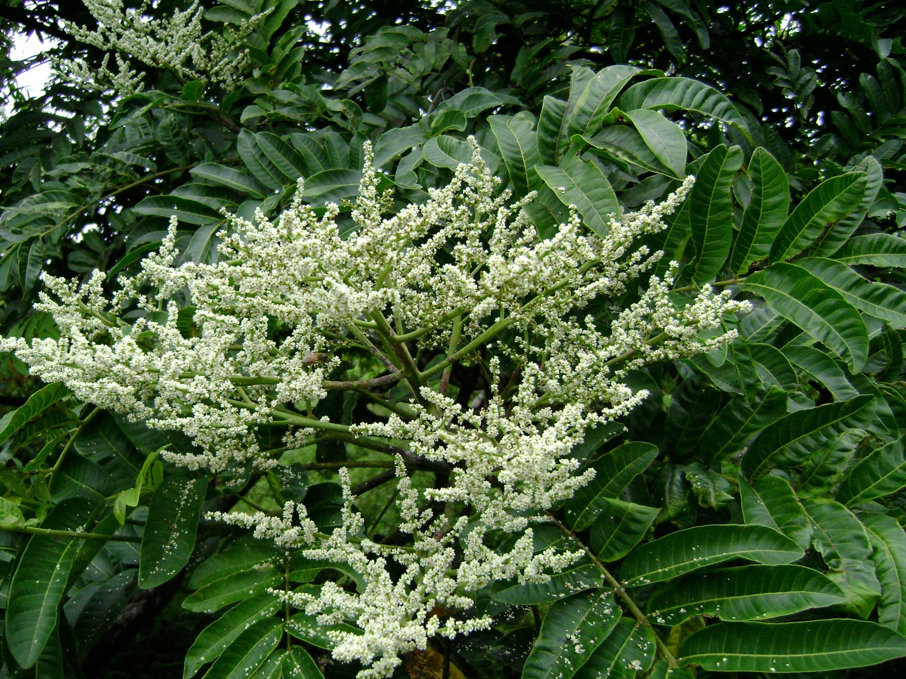 Rhus taitensis, flowering; (tavahi) in Tongatapu